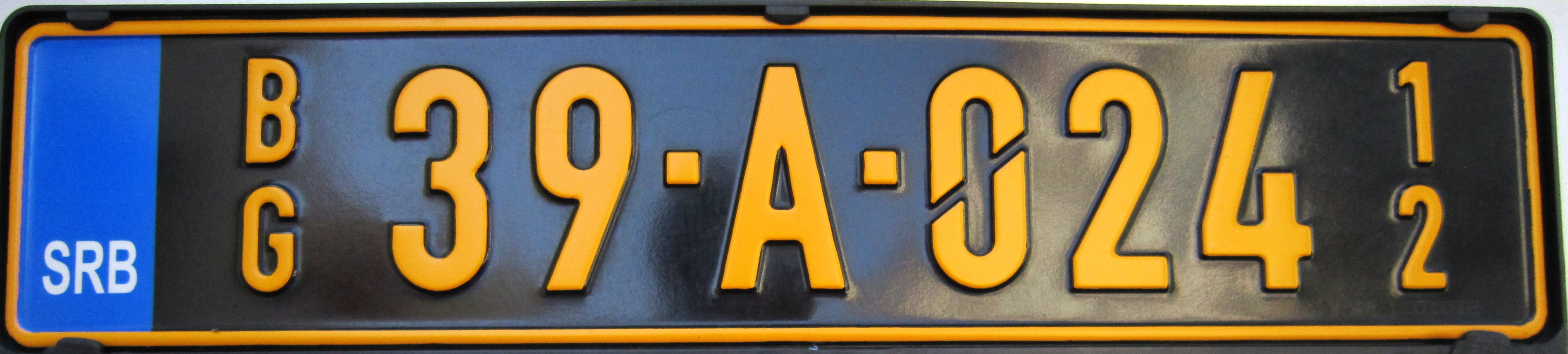 Servië CD kenteken